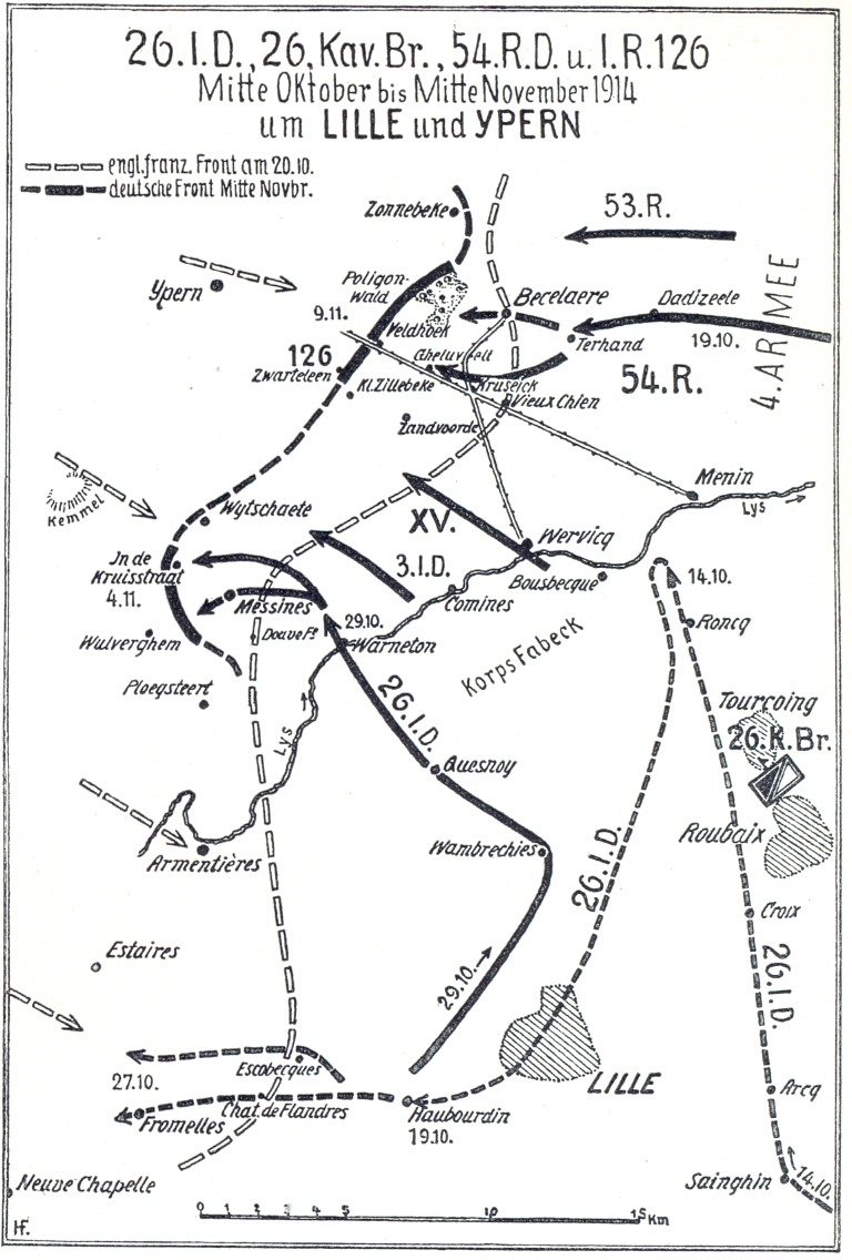 Karte Seite 30: 26. Infanterie-Division und 26. Kavallerie-Brigade um Lille und Ypern 1914